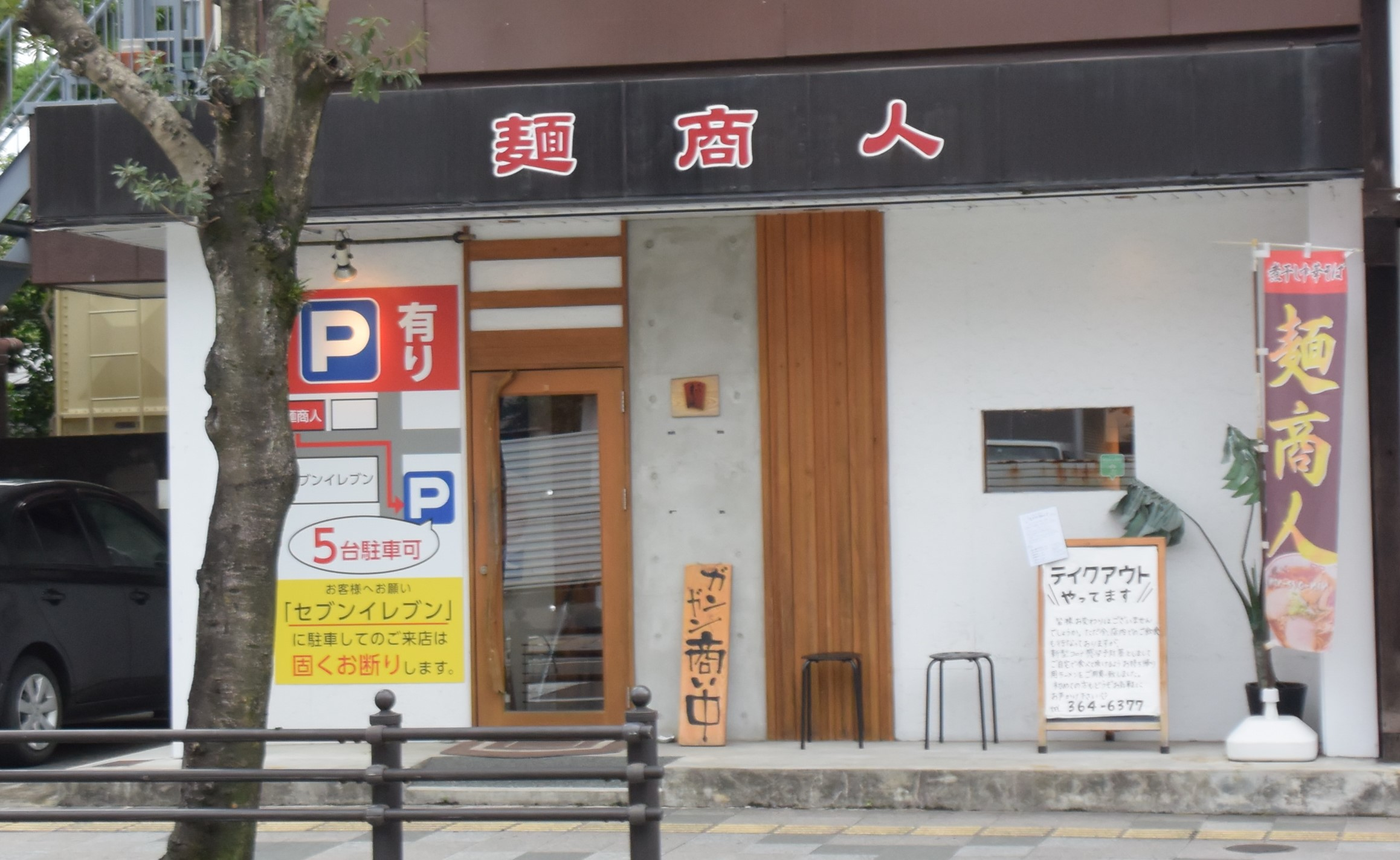 麺商人・外観